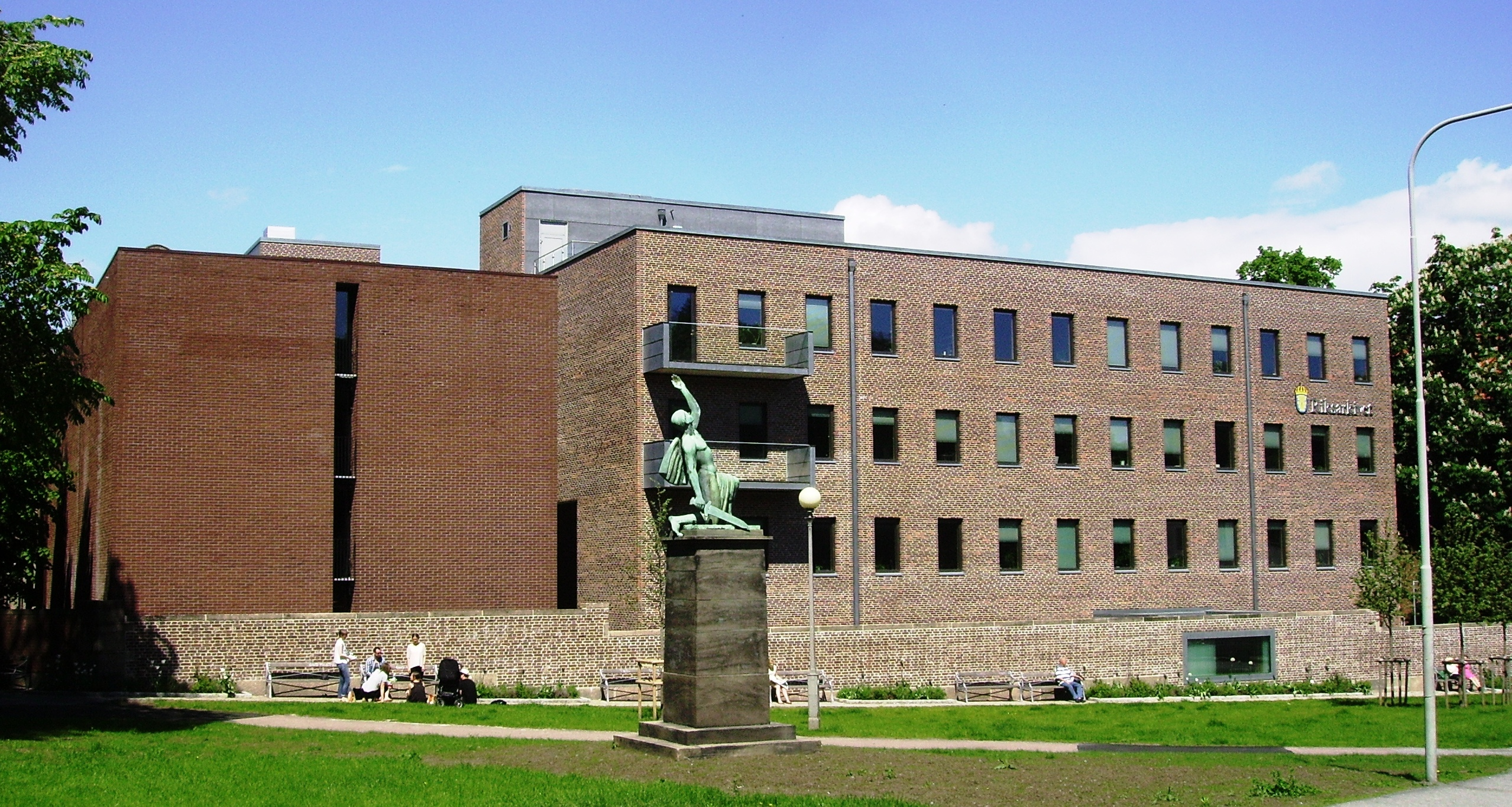 Picture of Landsarkivet in Göteborg (GLA), Riksarkivet.